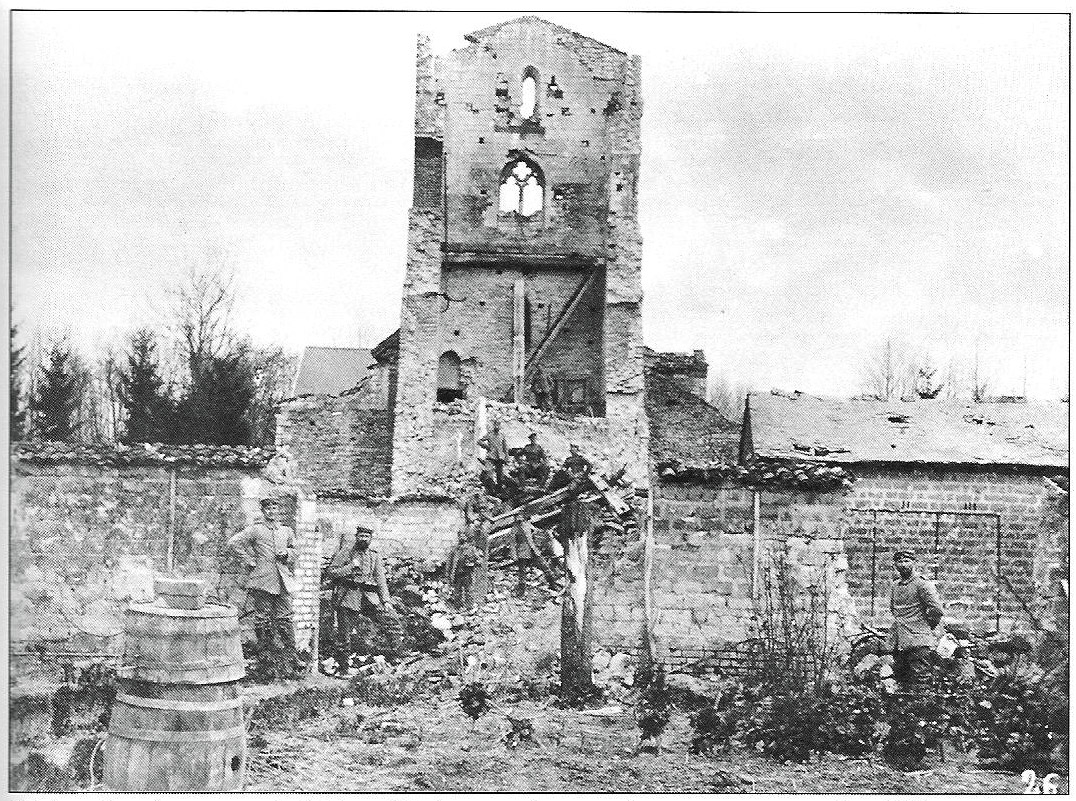 destructions de la Première Guerre mondiale .